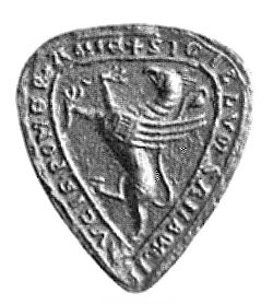 Sambor II Tczewski seal